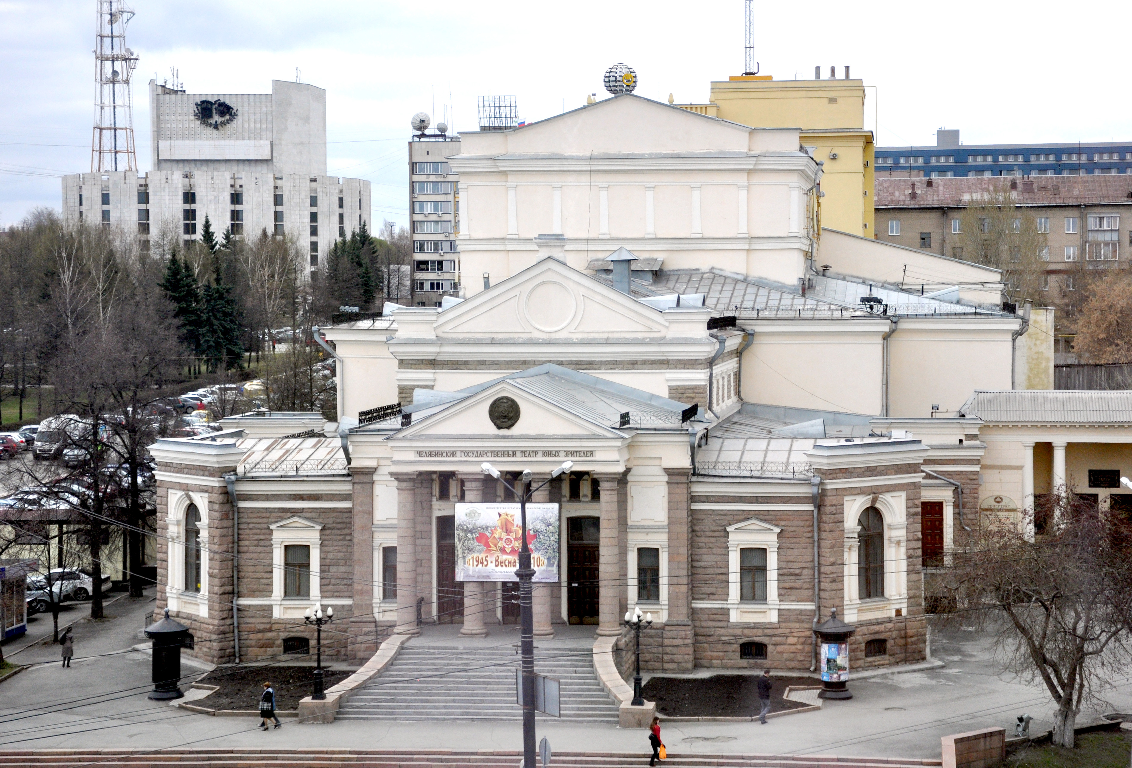 Челябинский государственный молодежный театр